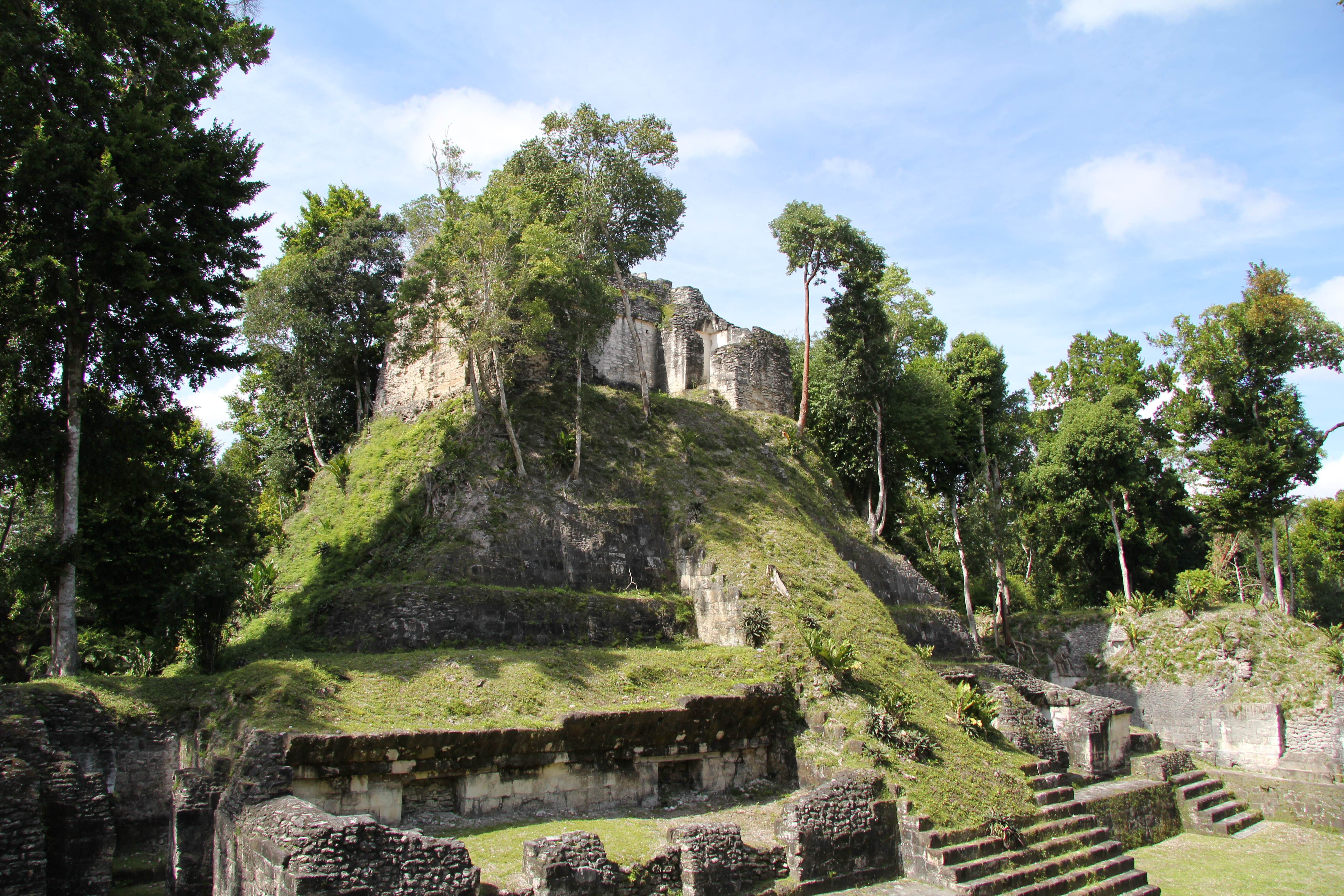 Sitio arqueológico Nakum, Parque Yaxhá Nakum Naranjo, Reserva de la Biosfera Maya, Petén, Guatemala